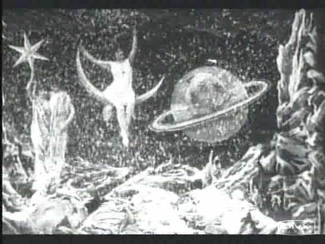 Méliès, viaggio nella luna (1902) 08